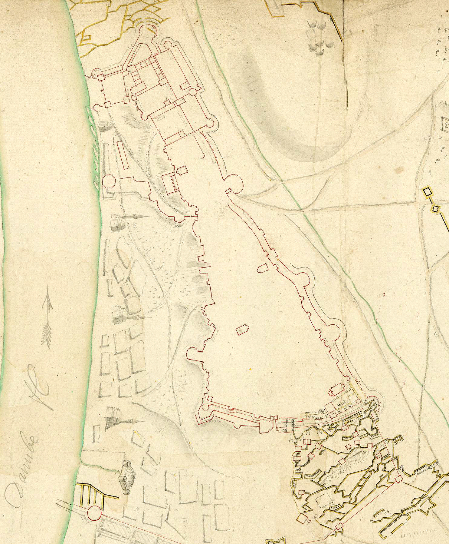 Buda. - (Plan des fortifications de Buda)